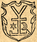 Герб Курч в книге Бартоша Папроцкого “Herby rycerztwa polskiego""